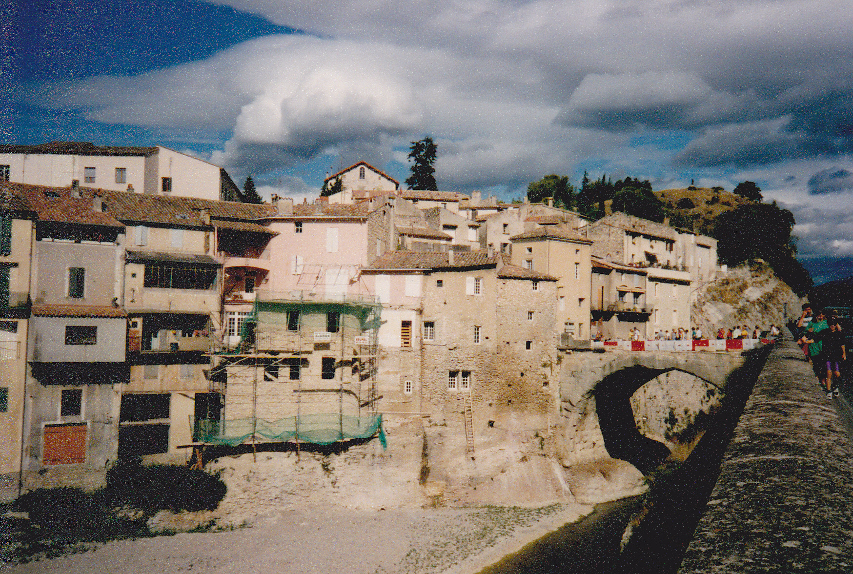 Pont sur L'Ouvèze à Vaison la Romaine (Vaucluse, France) : après la crue de septembre 1992.